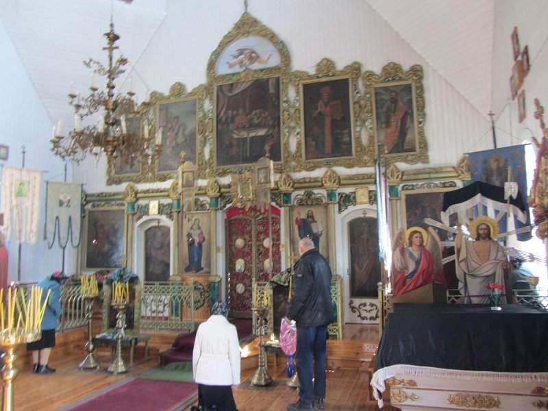 Вялікія Чучавічы. Свята-Пакроўская царква